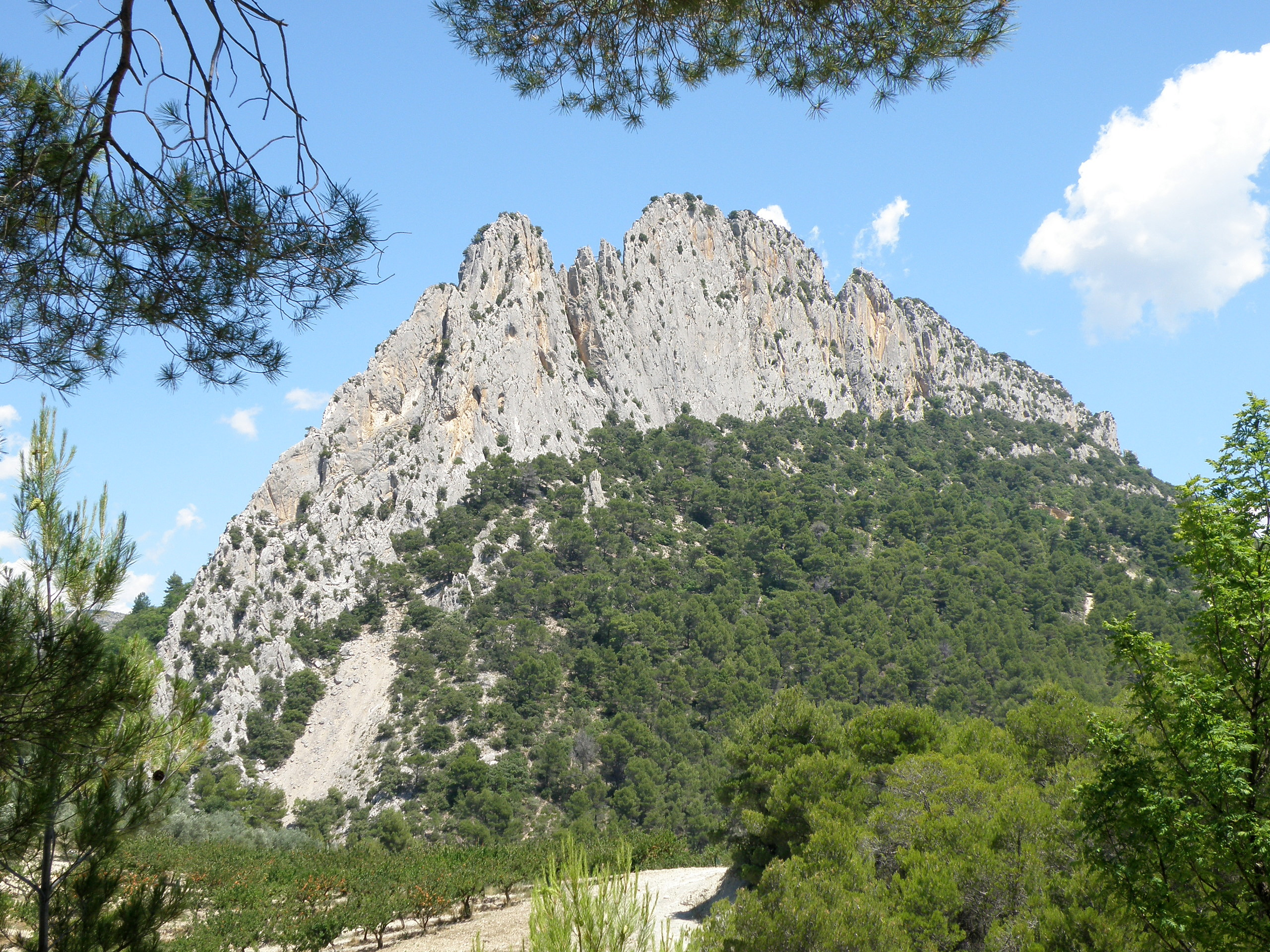 Buis-les-Baronnies (Drôme, France). Versant sud du rocher Saint-Julien en pleine lumière de midi.